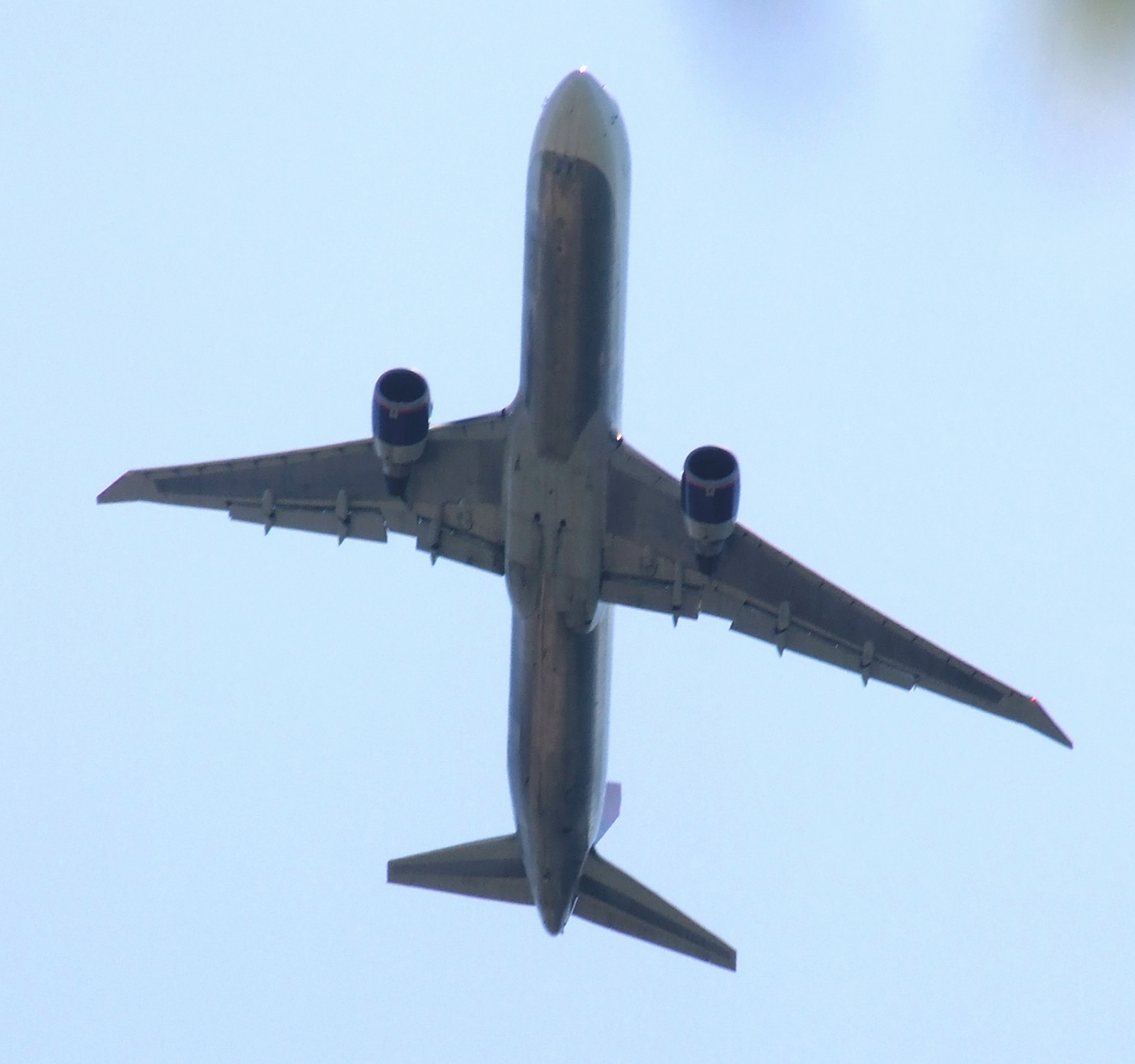 aereo